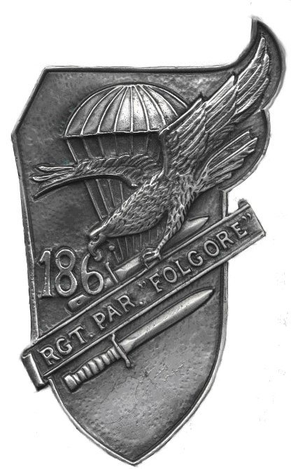 Distintivo appartenza del 186° reggimento paracadutisti "Folgore"